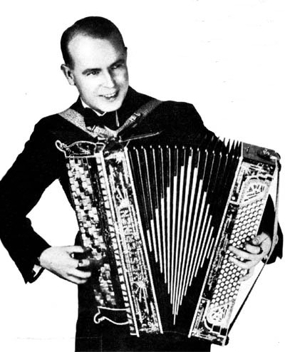 Kuvaa käytetty mm. Viljo Vesterinen kilpailuiden käsiohjelmissa 1978-1993.